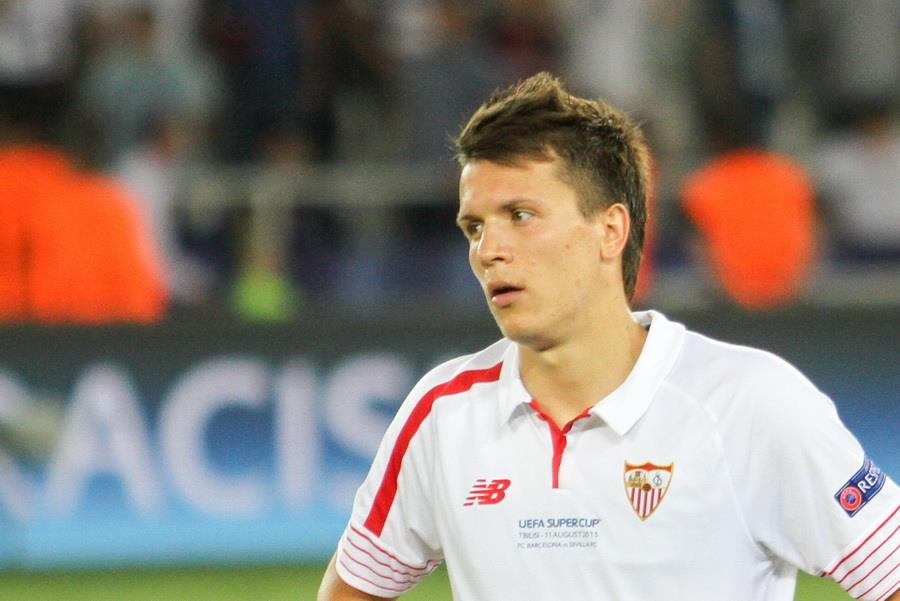 Матч за Суперкубок УЄФА 2015 року у Тбілісі. Грузія